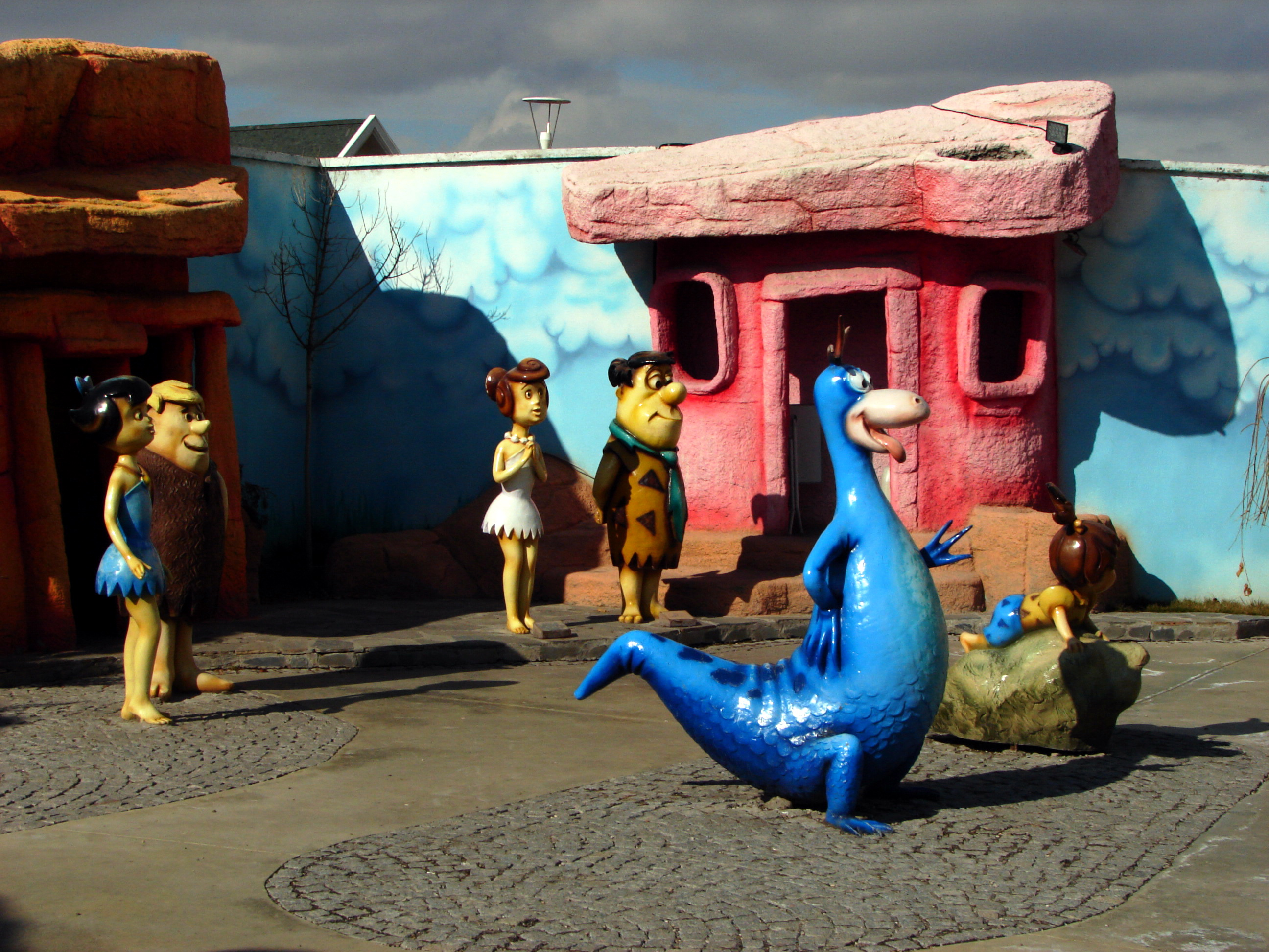 Ankara Amusement Park